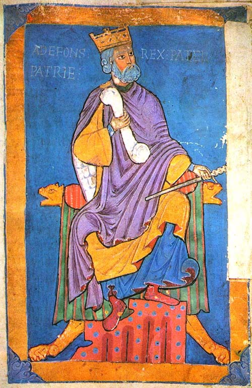 Miniatura que representa al rey Alfonso VI de León (1047-1109). Forma parte del Tumbo A de la catedral de Santiago de Compostela.